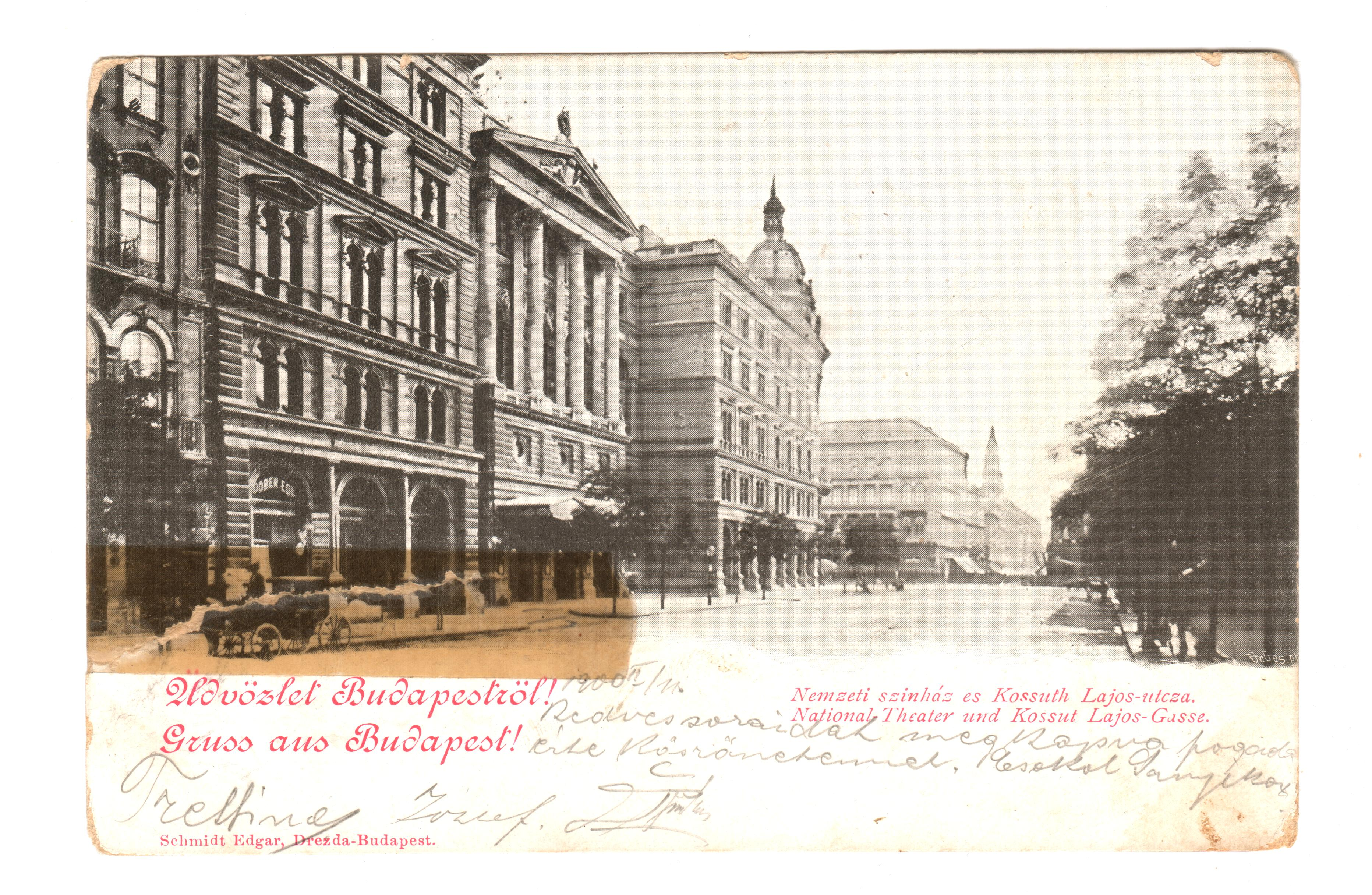 Nemzeti Színház képeslapon, Budapest